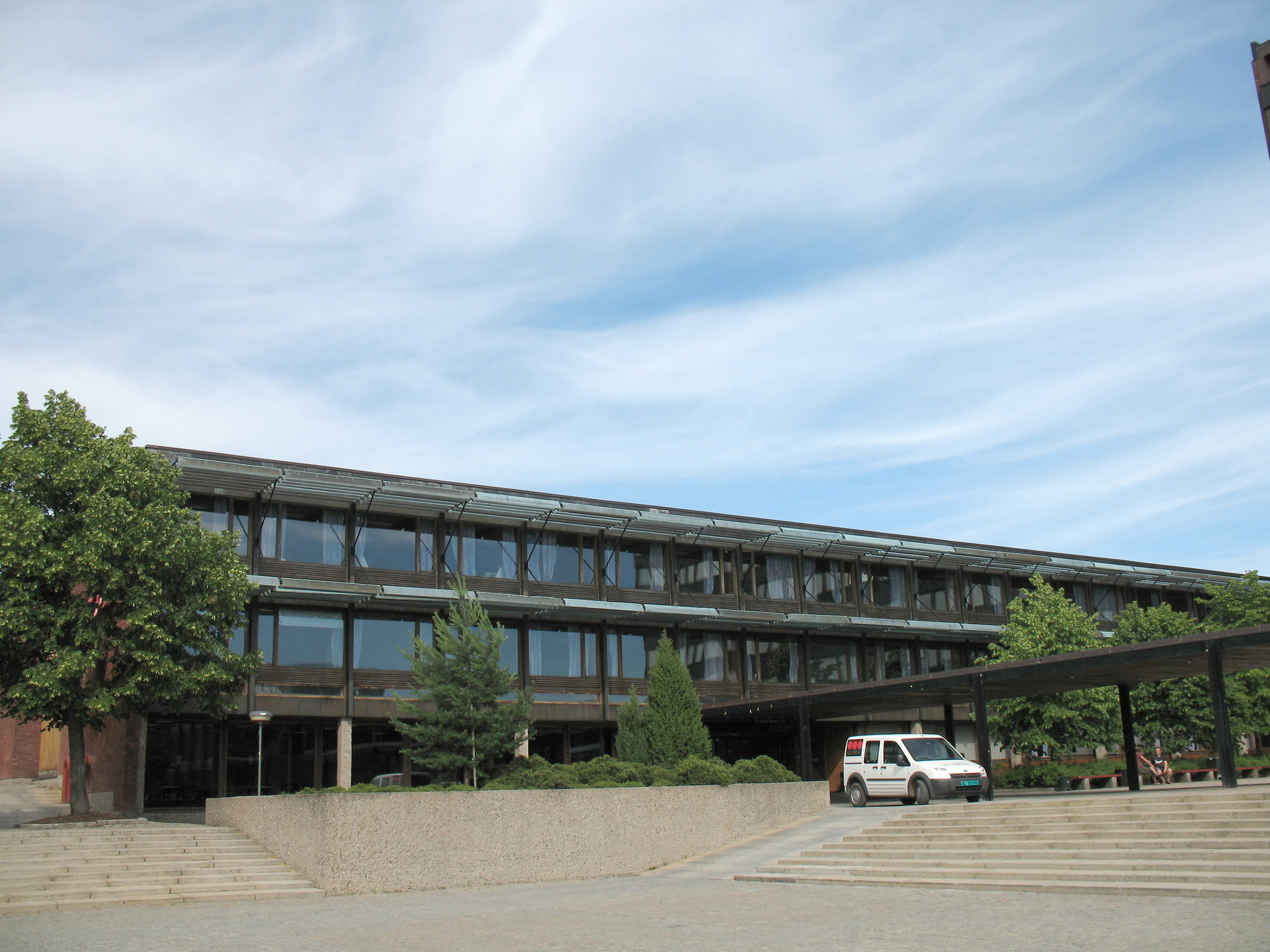 Vilhelm Bjerknes' hus. The University of Oslo